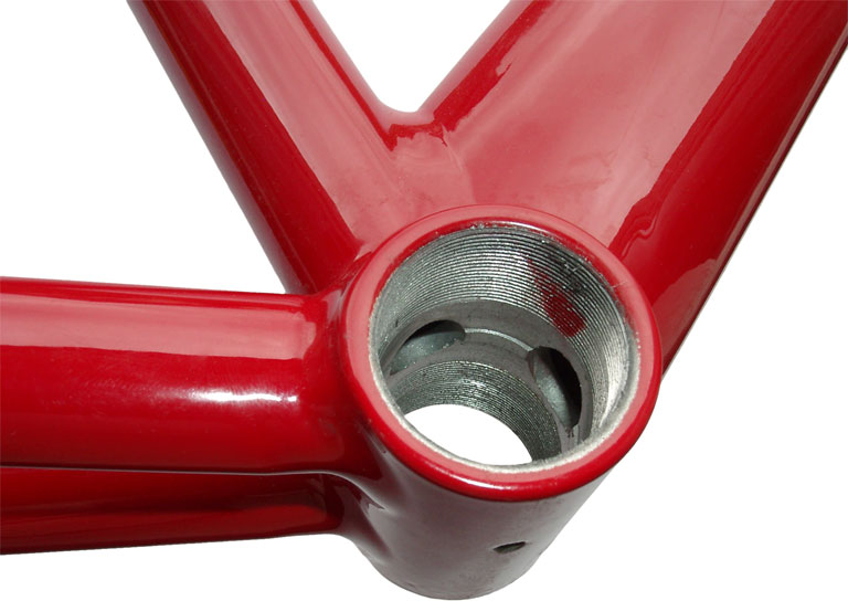 Tretlagermuffe